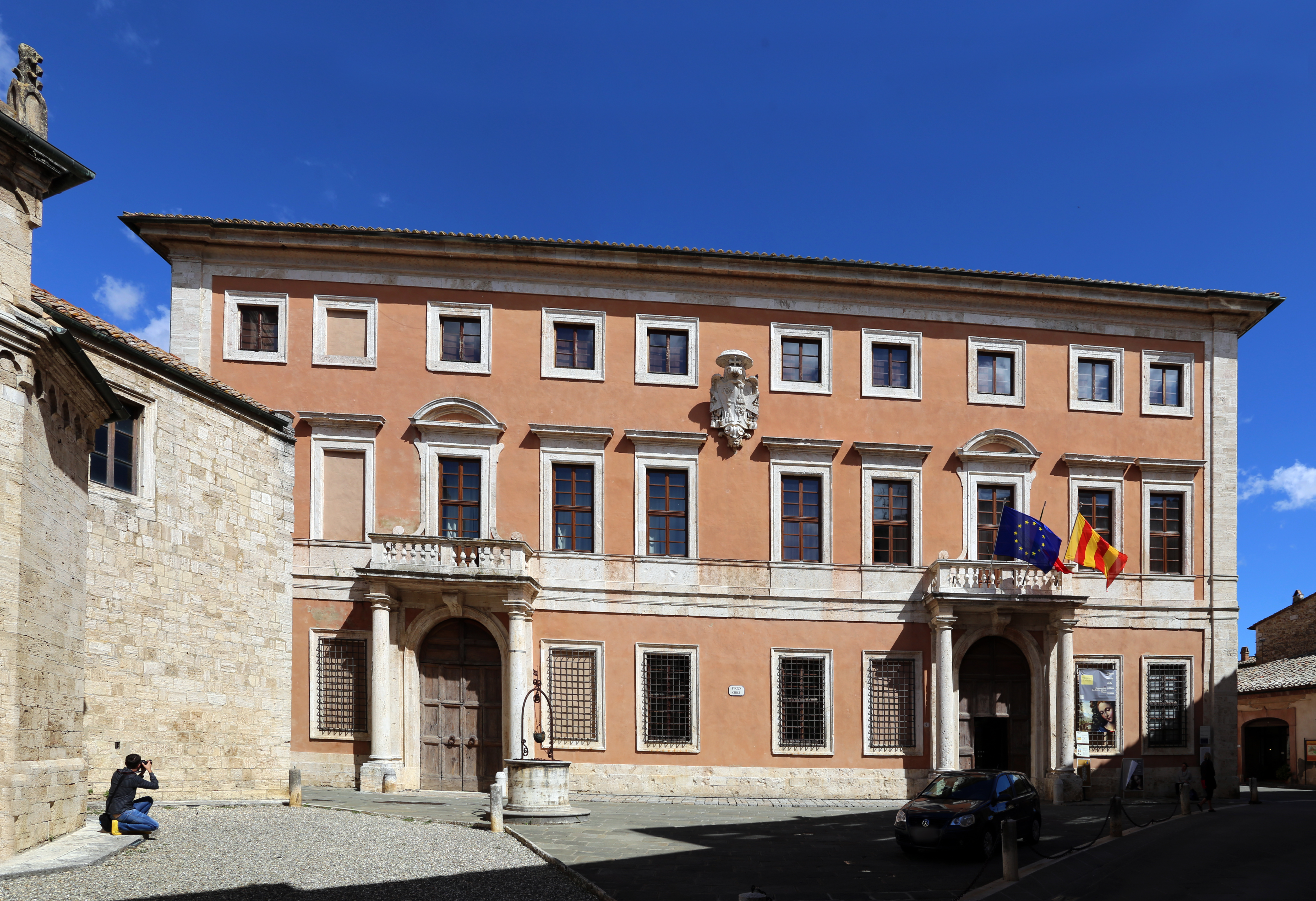 Palazzo Chigi Zondadari (San Quirico d'Orcia) This is a photo of a monument which is part of cultural heritage of Italy.